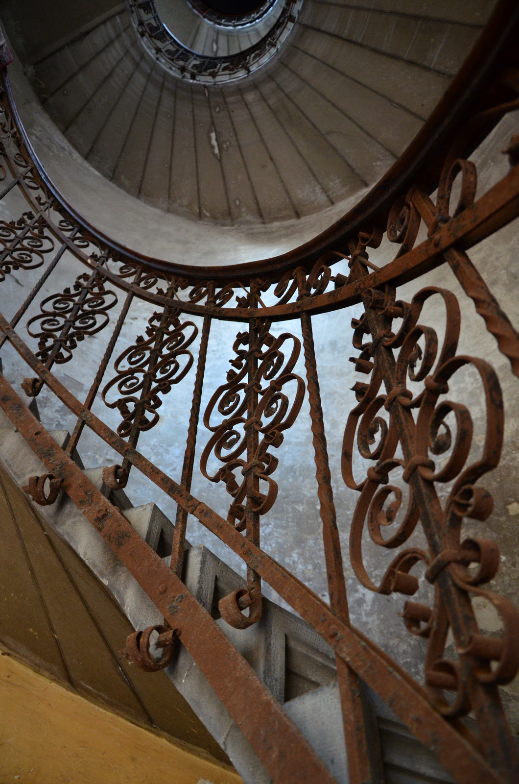 Lakóház (Budapest 8, Horánszky utca 16.) This is a photo of a monument in Hungary, Identifier: 12064